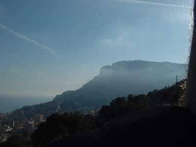 La tête de chien Photo prise par Ulysse23 17 nov 2004 à 20:50 (CET), libre de droit.